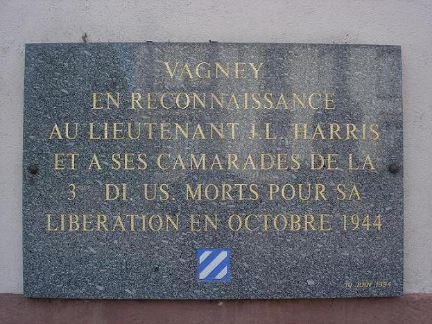 Plaque commémorative apposée par la mairie de Vagney (Vosges - France) afin de rendre hommage au lieutenant J. L. Harris et à ses camarades de la 3e DI US morts pour la libération de Vagney en octobre 1944